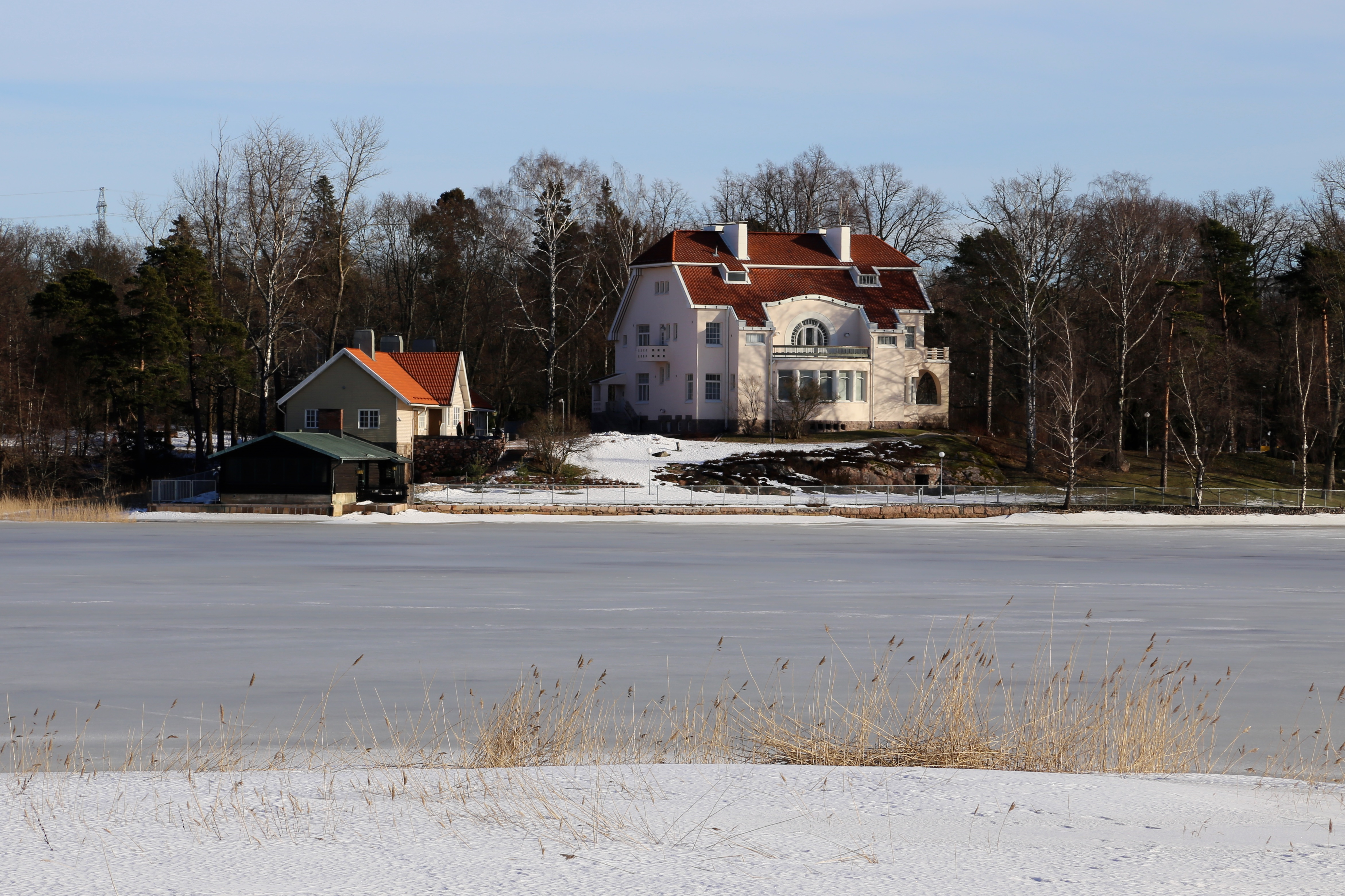 Tamminiemi